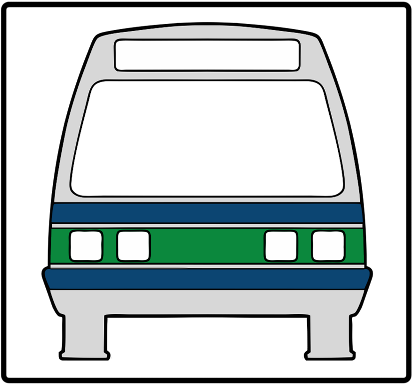 Parada